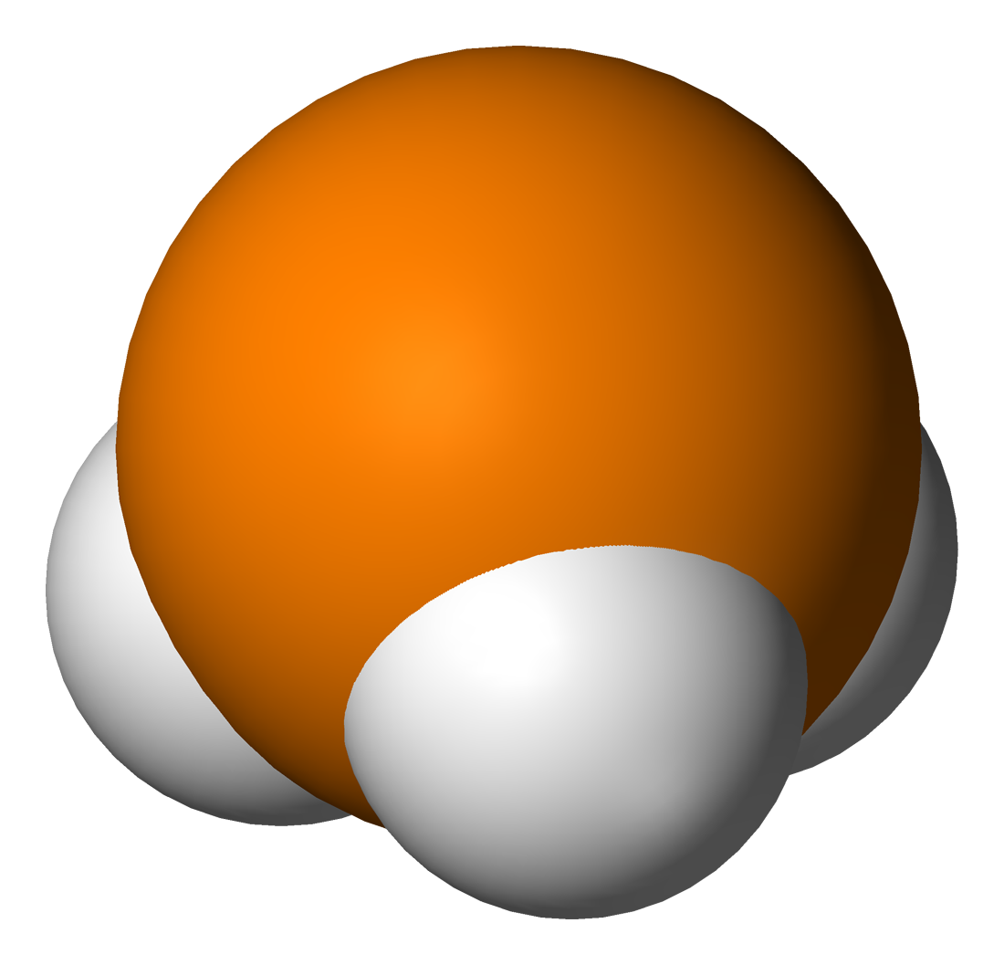 Phosphine-3D-vdW